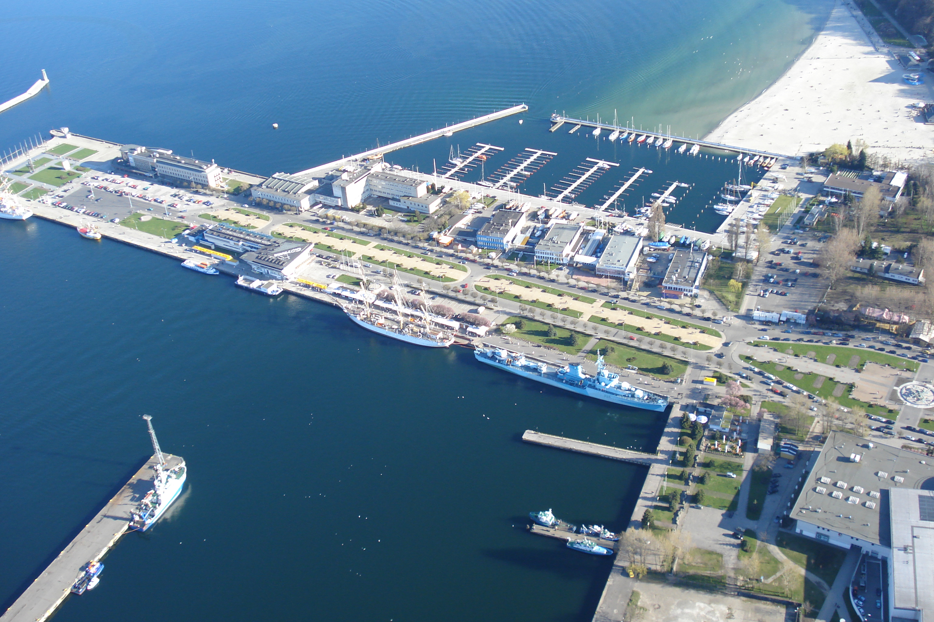 Gdynia z "lotu ptaka"